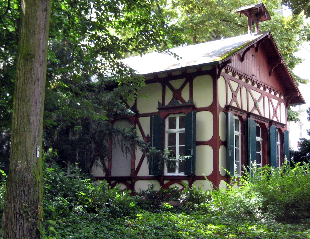 Gärtnerhaus im Park der Villa Metzler